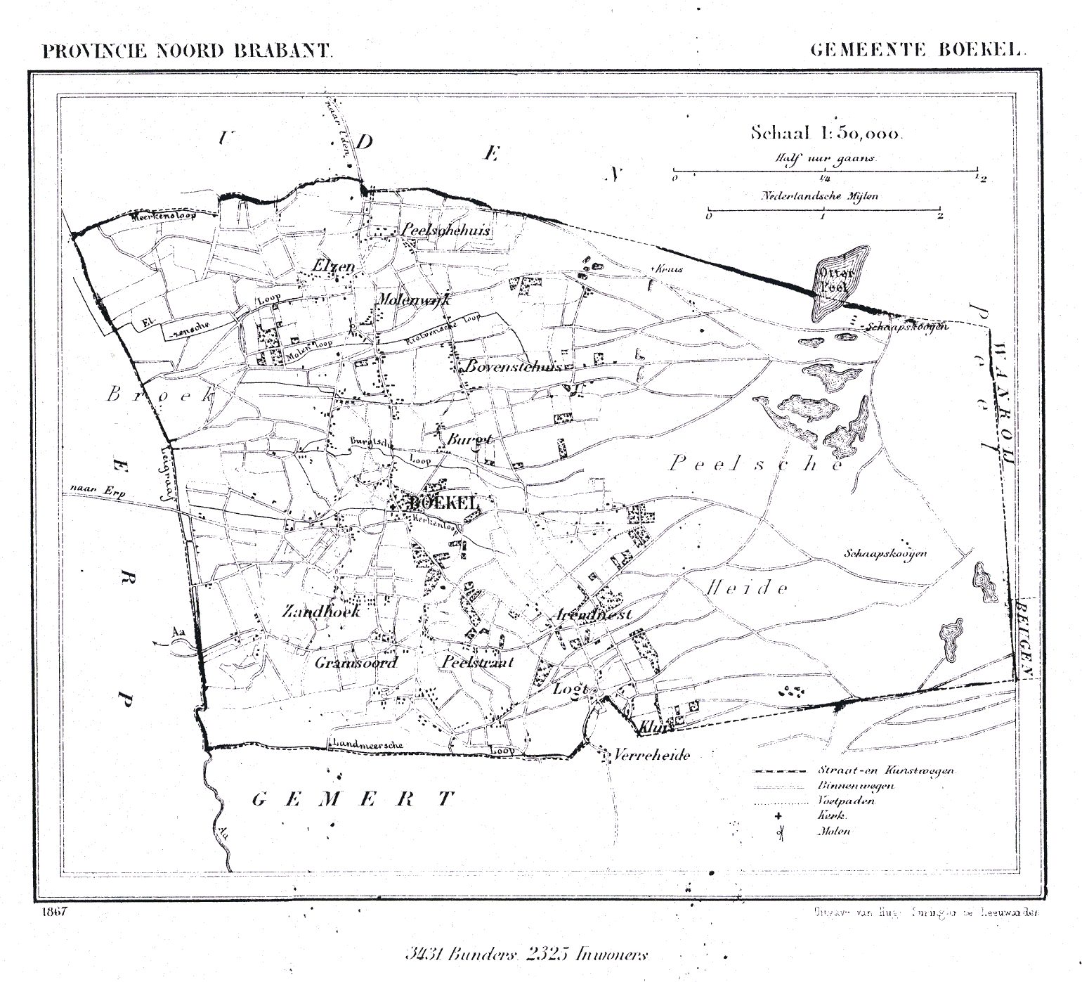 Nederland, Noord-Brabant, Gemeente Boekel